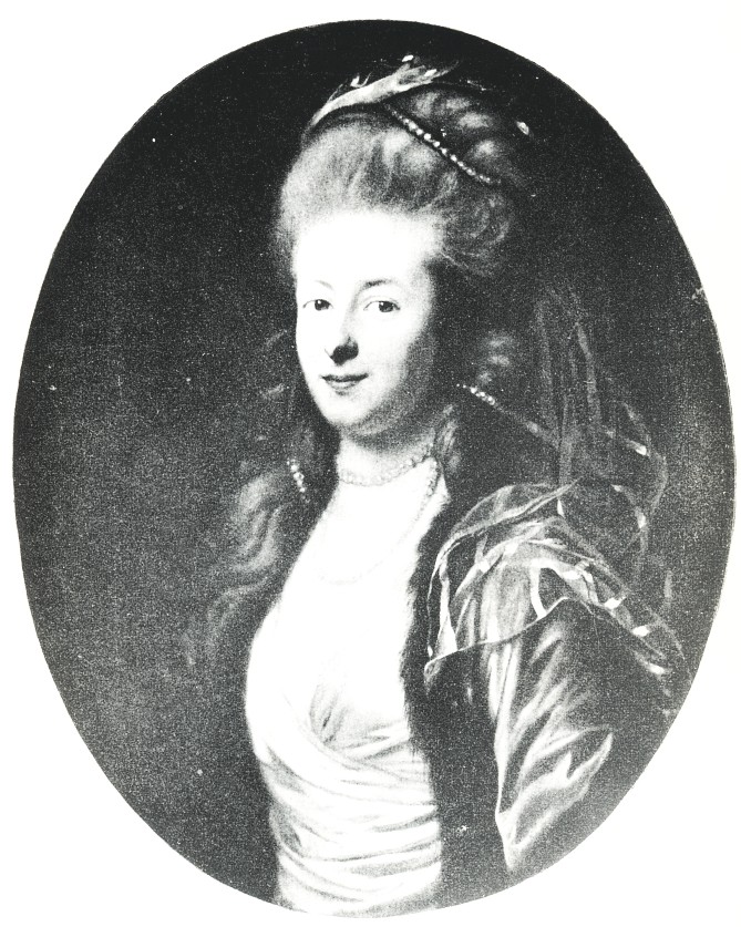 Porträt der Berliner Salonnière Henriette von Crayen, geb. Leveaux.